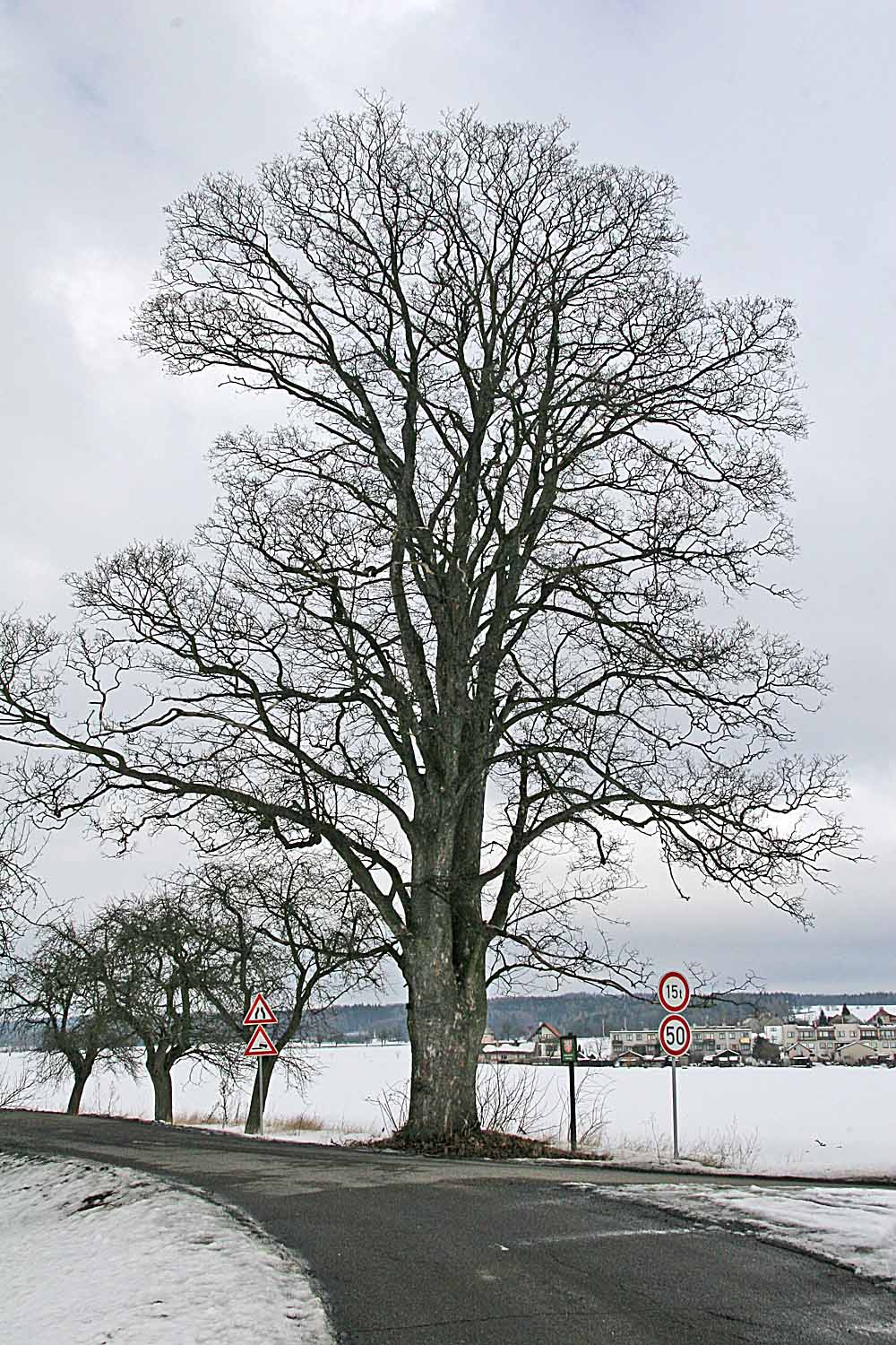 Památný javor klen u Cerekvice, okres Jičín